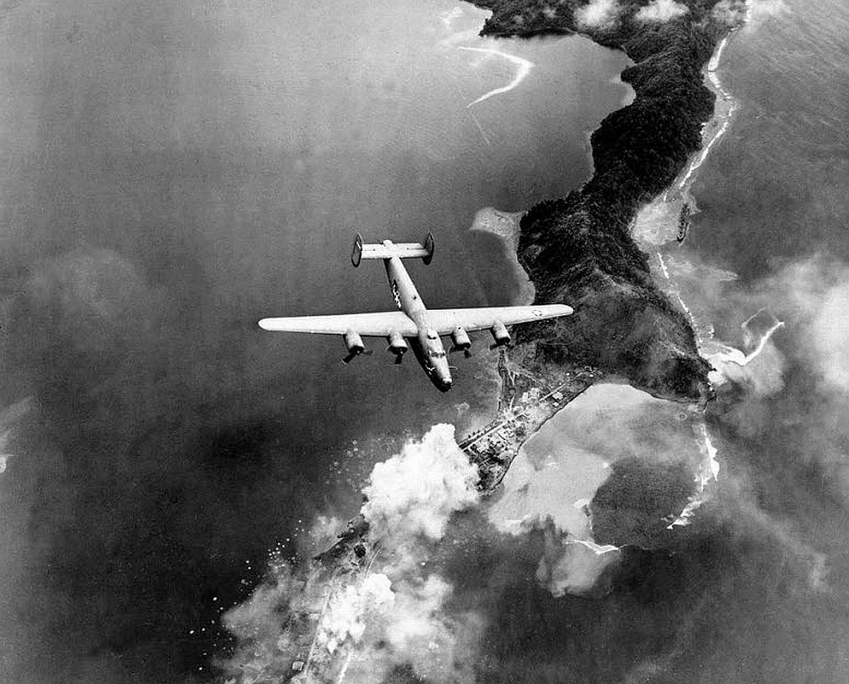 B-24 bomber over Salamaua